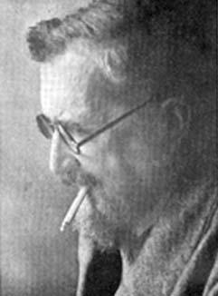 Foto di Gaetano Scorza